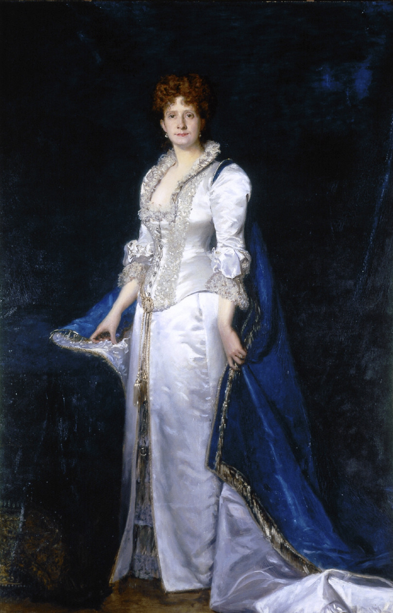 Retrato da Rainha D. Maria Pia de Portugal (1847-1911) em exposição na Sala do Retrato da Rainha no Palácio Nacional da Ajuda